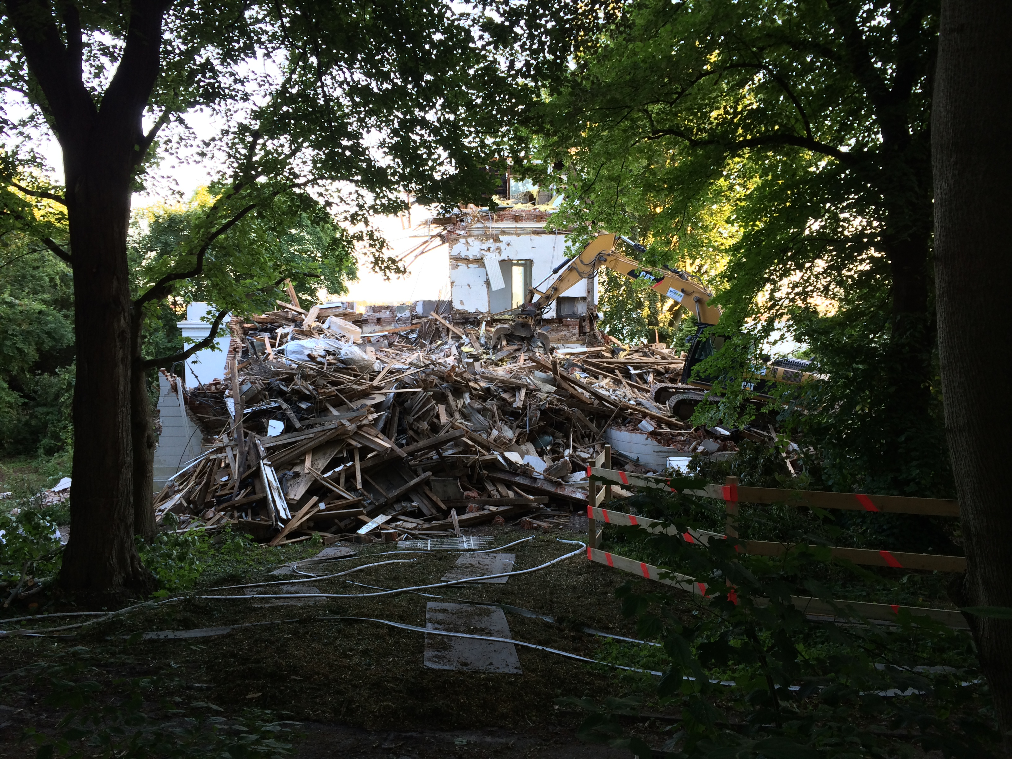 Grossner Villa in Nienstedten am 17.06.14, von der Straße aus